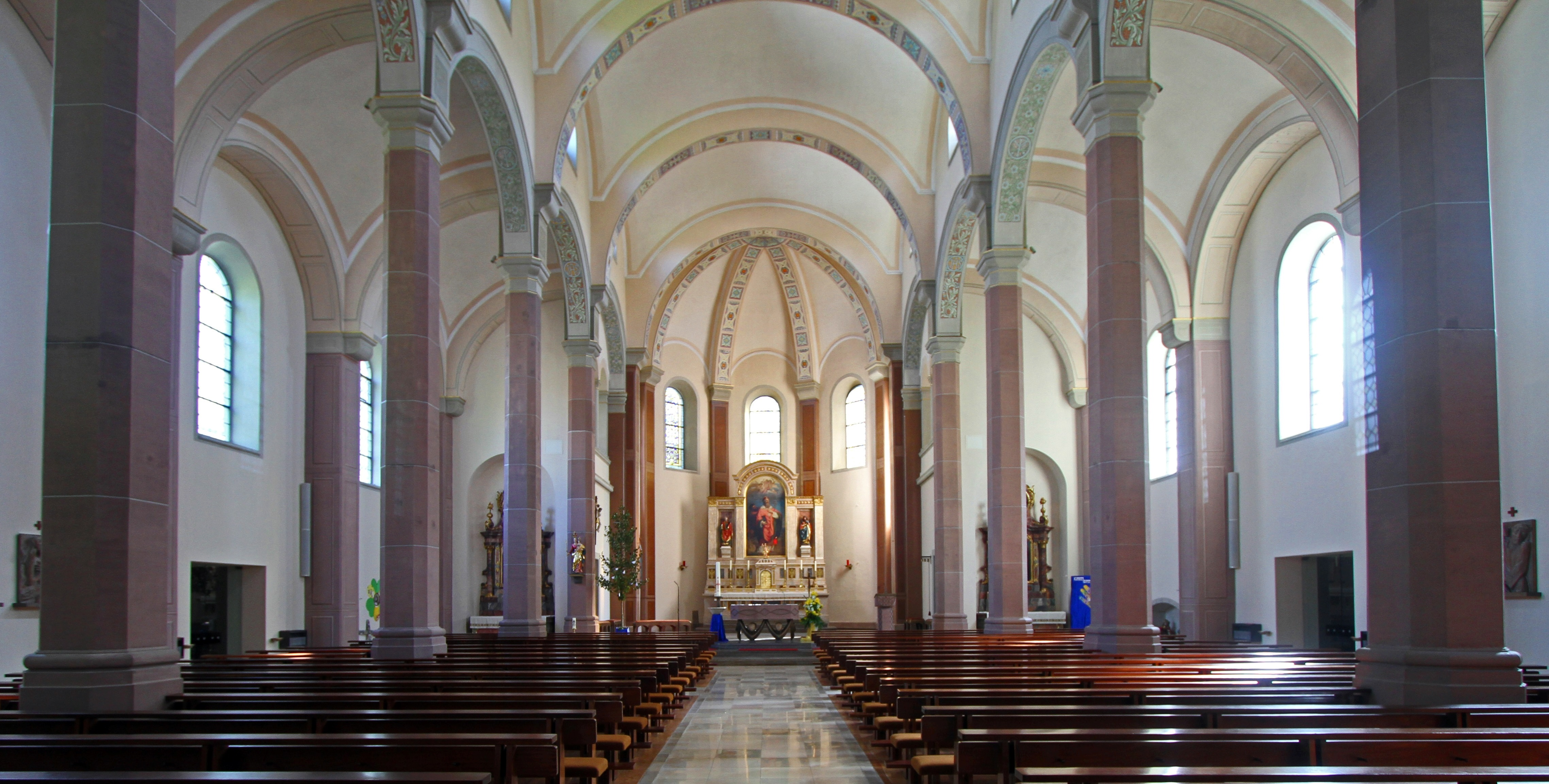 Kath. Kirche St. Dionysius, Baden-Baden-Oos